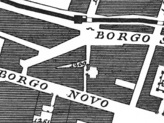 Santa Maria della Purità - Mapa de Nolli (1748) - Sheet1